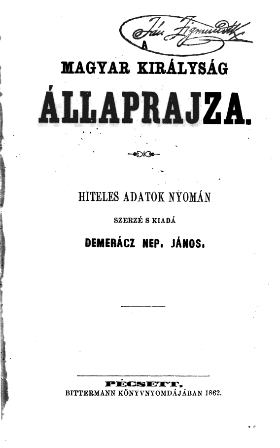 Demerácz János A magyar királyság állaprajza című művének címlapja.